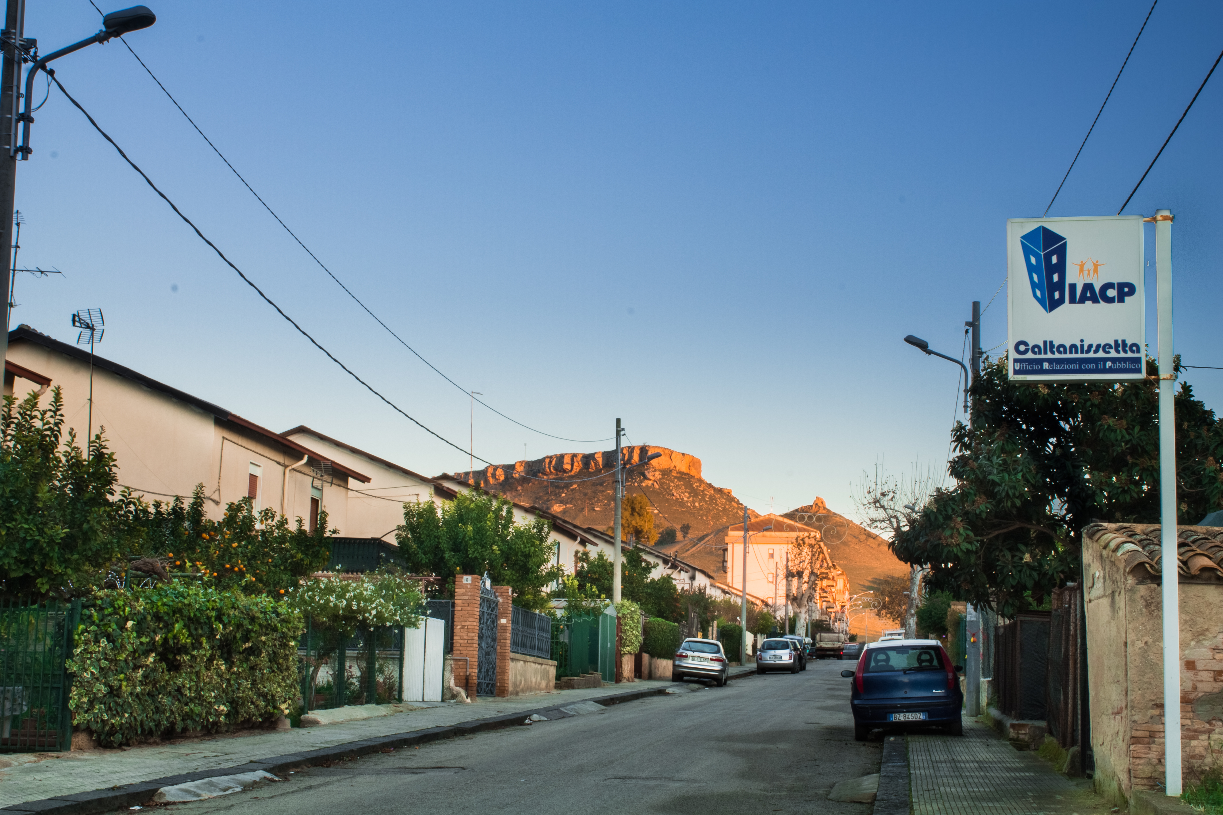 Villaggio Santa Barbara, via del Minatore. Sullo sfondo il monte Sabucina.